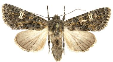 Polymixis serpentina minoica